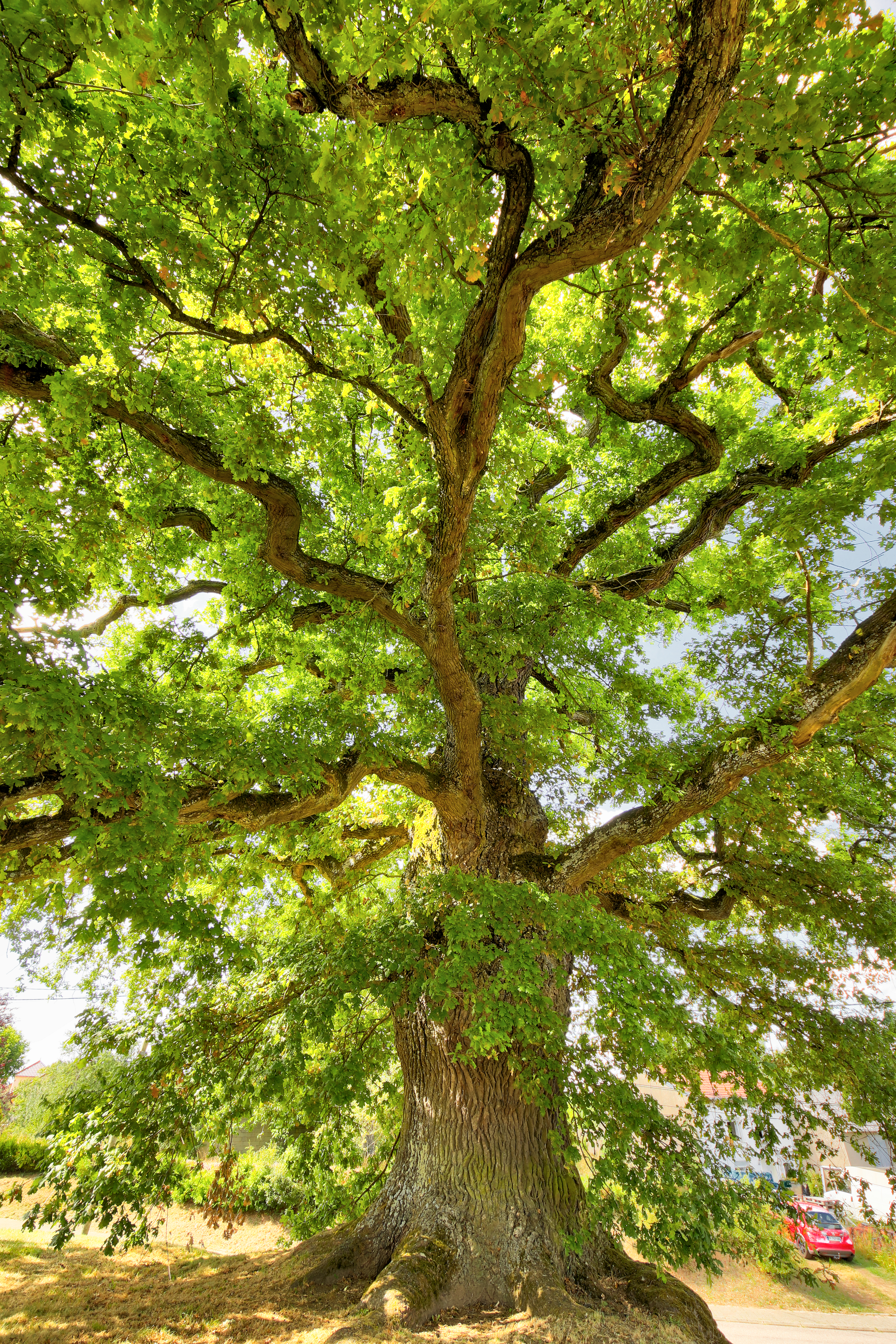 Stieleiche (quercus robur) an der Kreuzung der rue du moulin und der rue du stade in Waldweistroff